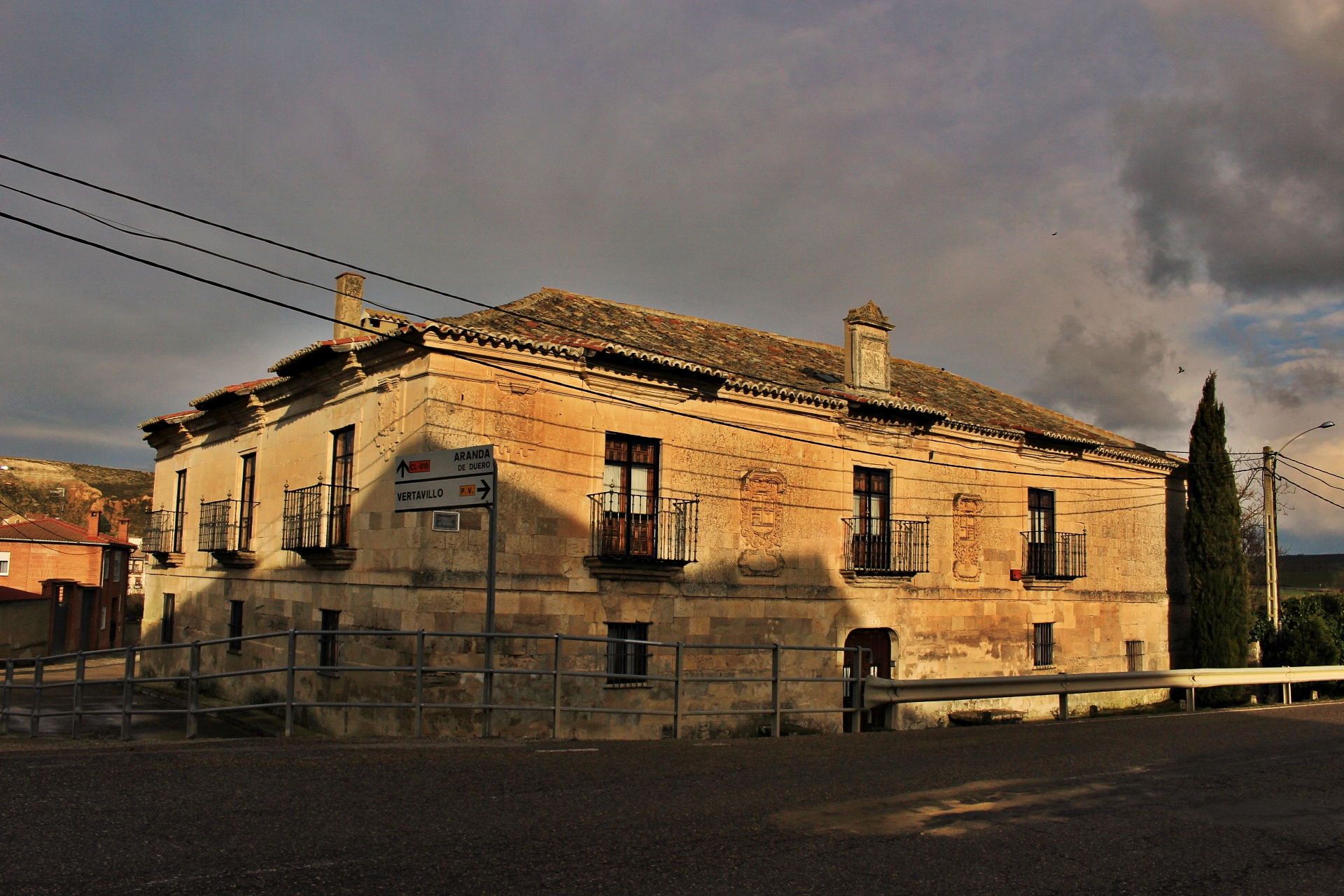 Palacio de los Calvo